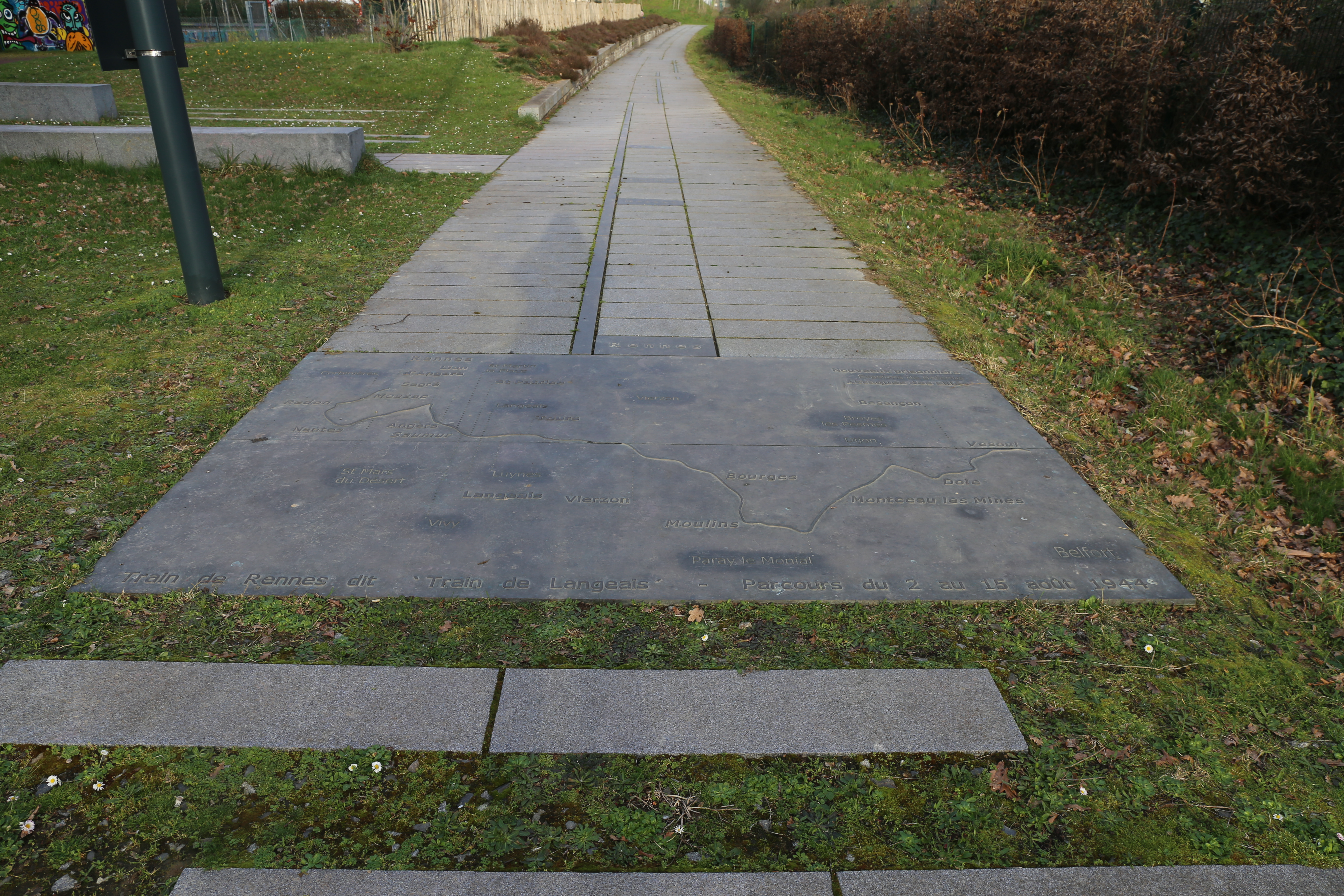 Monuments aux déportés du 3 août 1944 à Rennes, Ille-et-Vilaine, Bretagne.